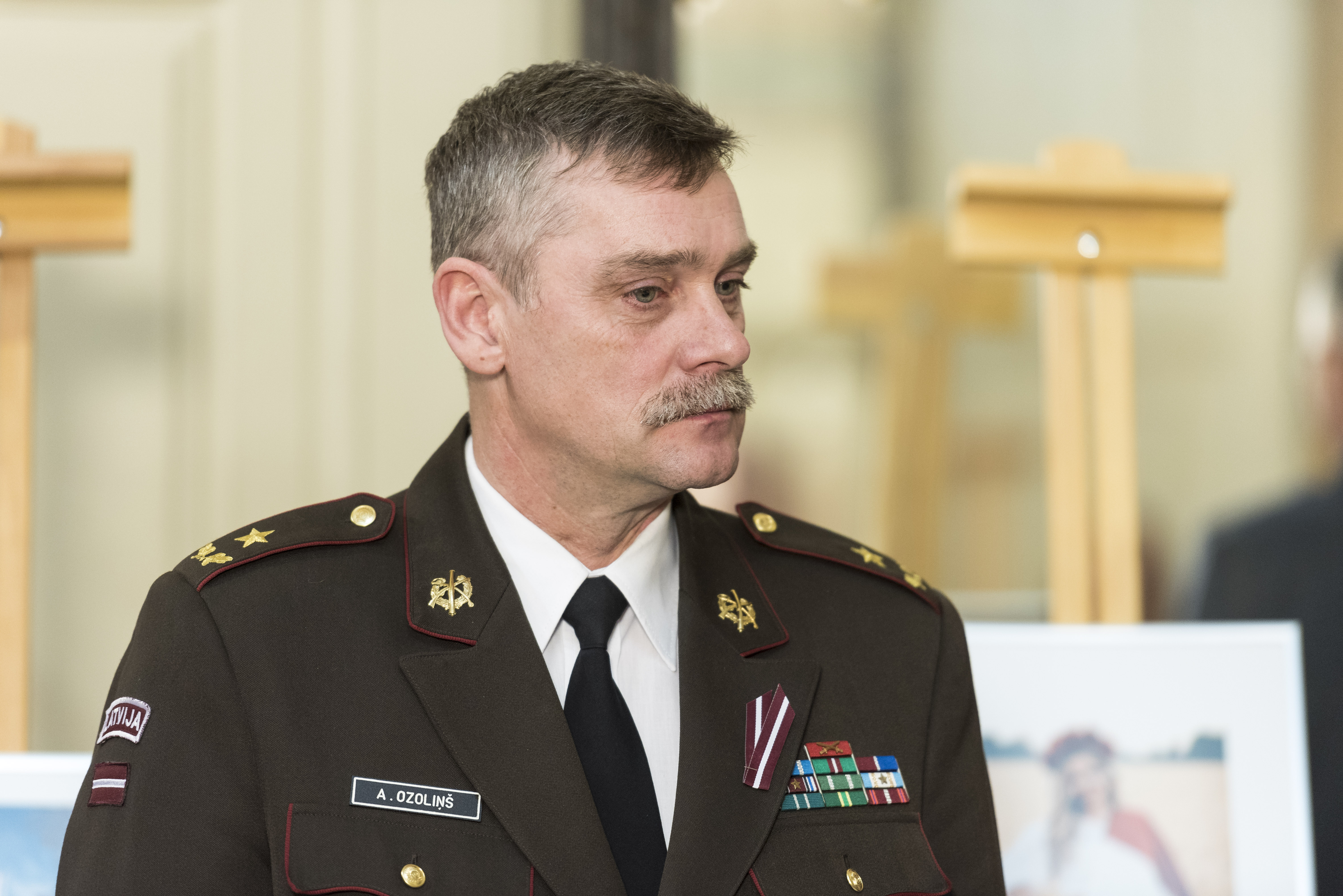 2017.gada 9.novembris. Lāčplēša dienai veltītā skolēnu fotokonkursa "Mūsu karogs" izstādes atklāšana. Foto: Reinis Inkēns, Saeimas Administrācija Izmantošanas noteikumi: saeima.lv/lv/autortiesibas